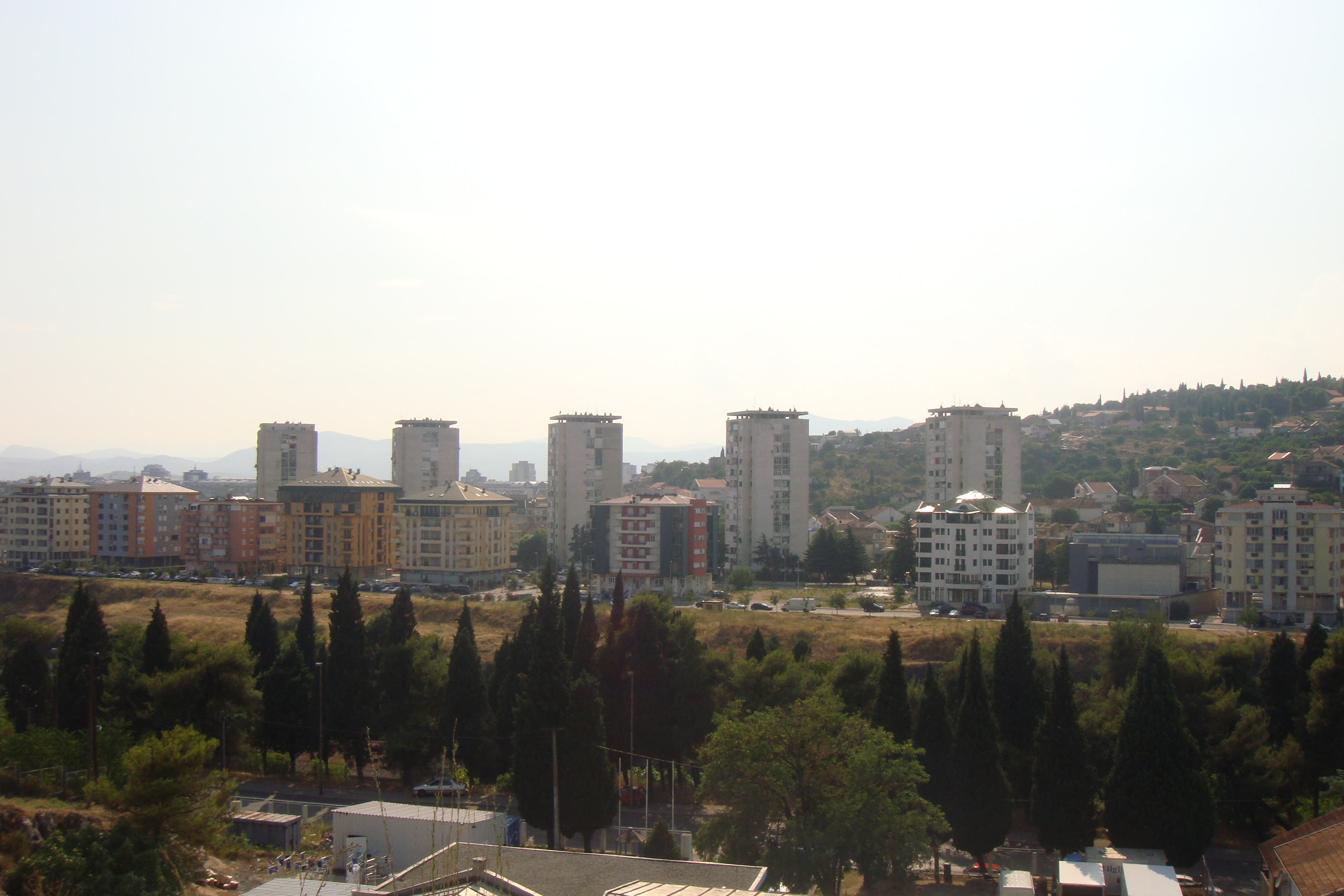 Pet udovica